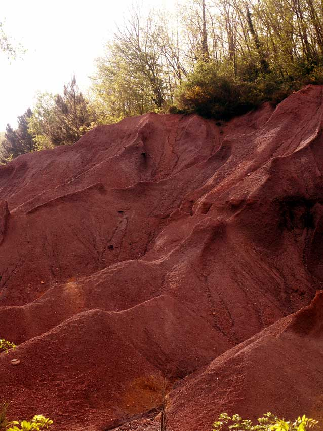 Le Roste (Comune di Monieri, Grosseto). L'area delle Roste, lungo il fiume Merse e visibile dalla strada che collega Massa Marittima con Siena, raccoglie i resti delle lavorazioni del rame a partire dalla fine del XIX, inizi del XX secolo, avvenute con il metodo Conedera.